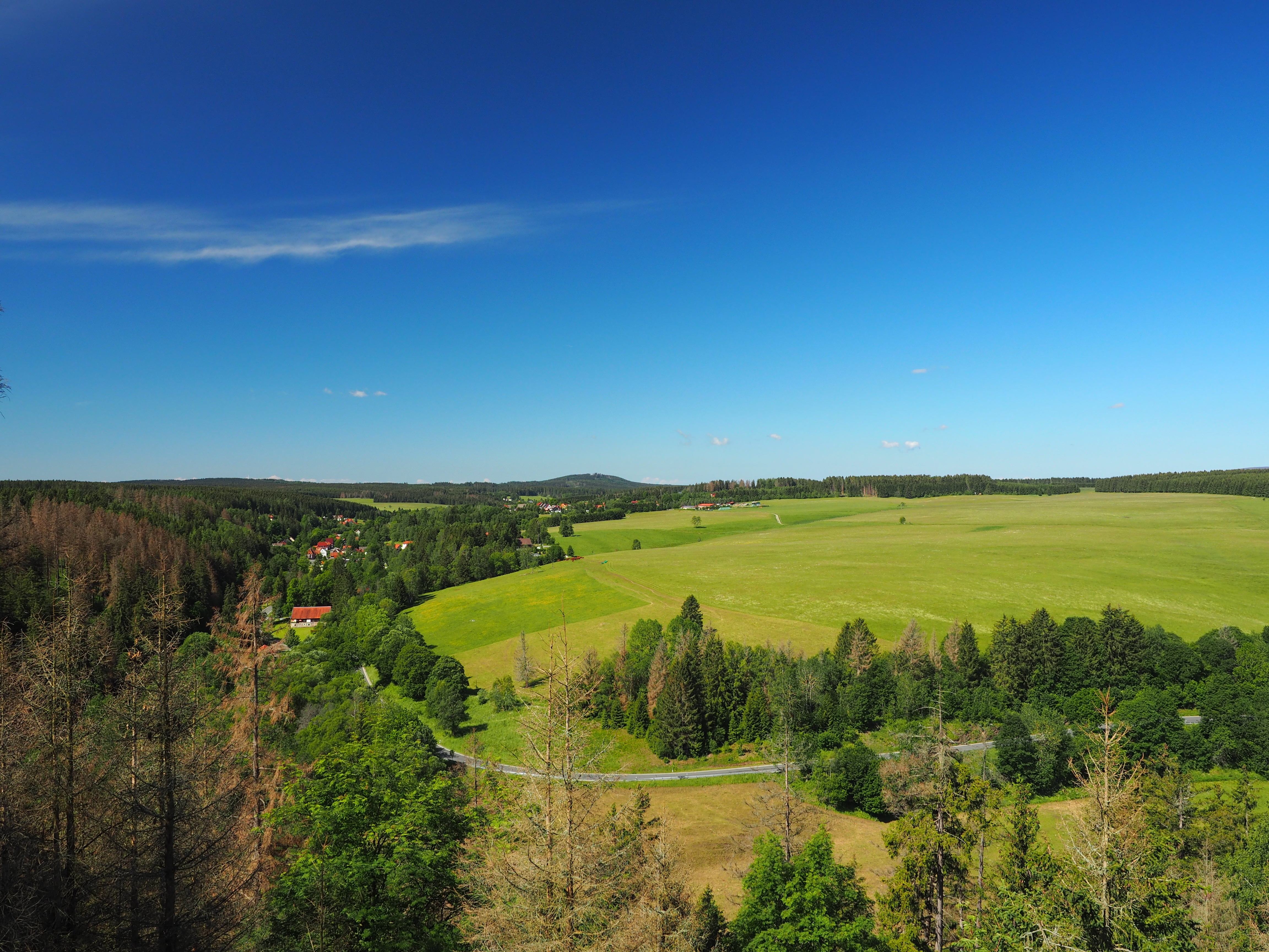 Blick vom Aussichtspunkt des Kapitelsberges im Landschaftsschutzgebiet LSG 0032WR "Harz und Vorländer" auf den Ortsteil Tanne der Stadt Oberharz am Brocken.